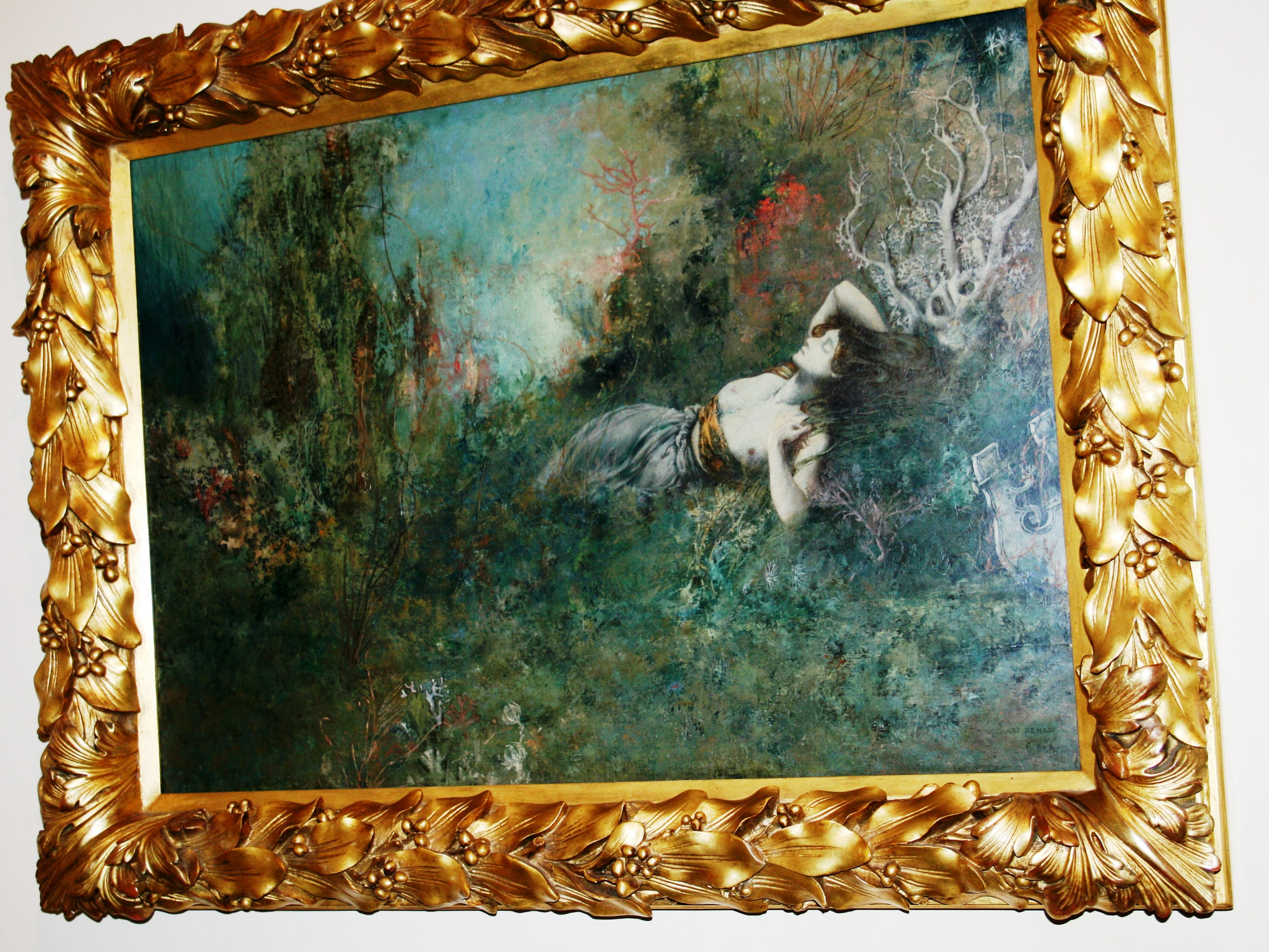 Sapho, tableau d'Ary Renan (1858-1900), peintre symboliste, fils d'Ernest Renan et Cornélie Sheffer. Maison natale d'Ernest Renan, Tréguier, Côtes-d'Armor, France.